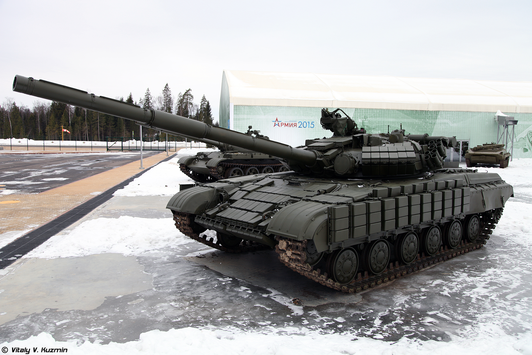 Т-64БВ образца 1987 года.